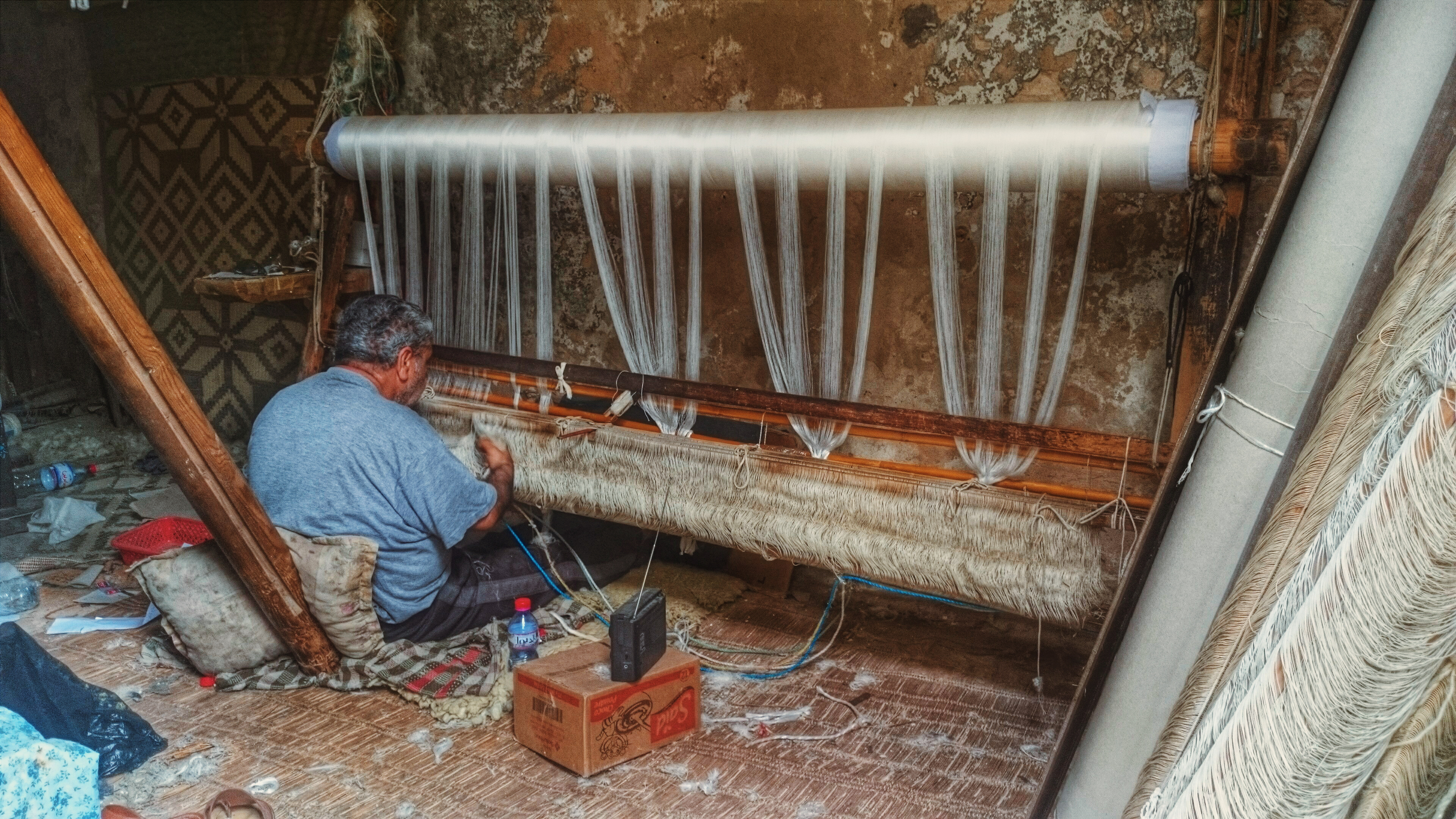 أحد الحرفيين المختصين في تحضير الحرير ليسهل استعماله من قبل الحرايرية This is an image of "African people at work" from Tunisia